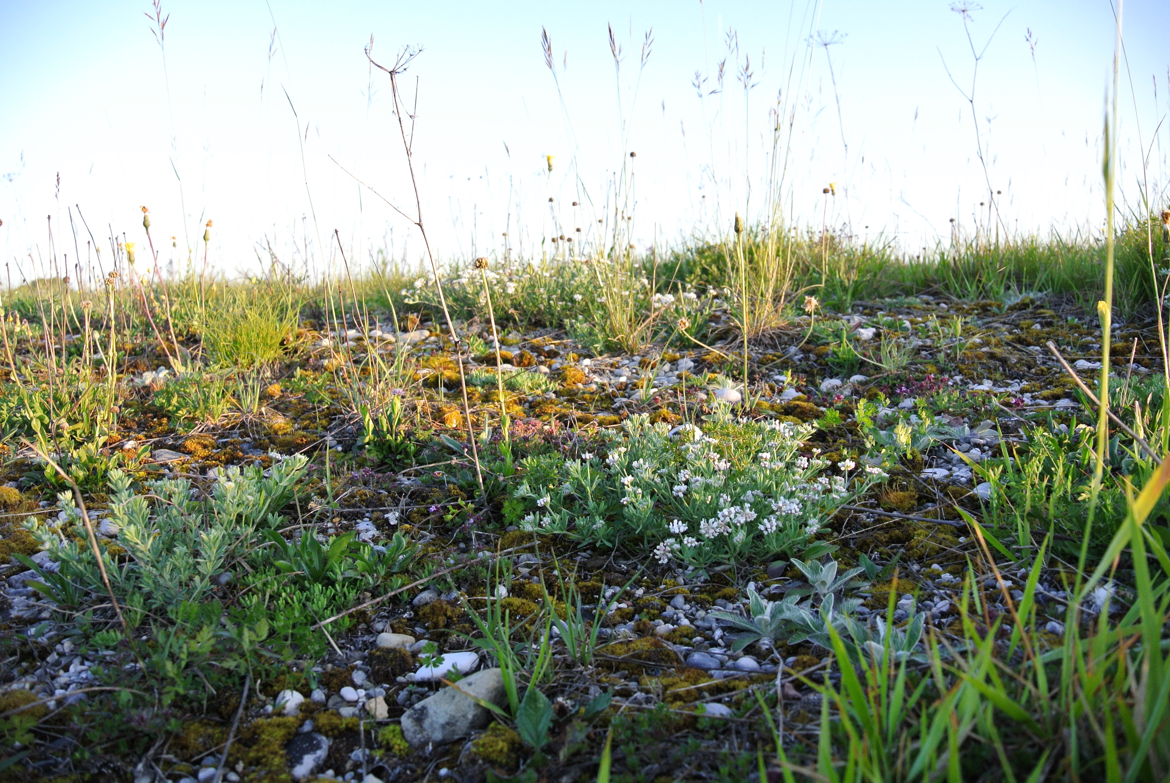 Naturschutzgebiet Garchinger Heide, NSG-00389.01, typische Flora